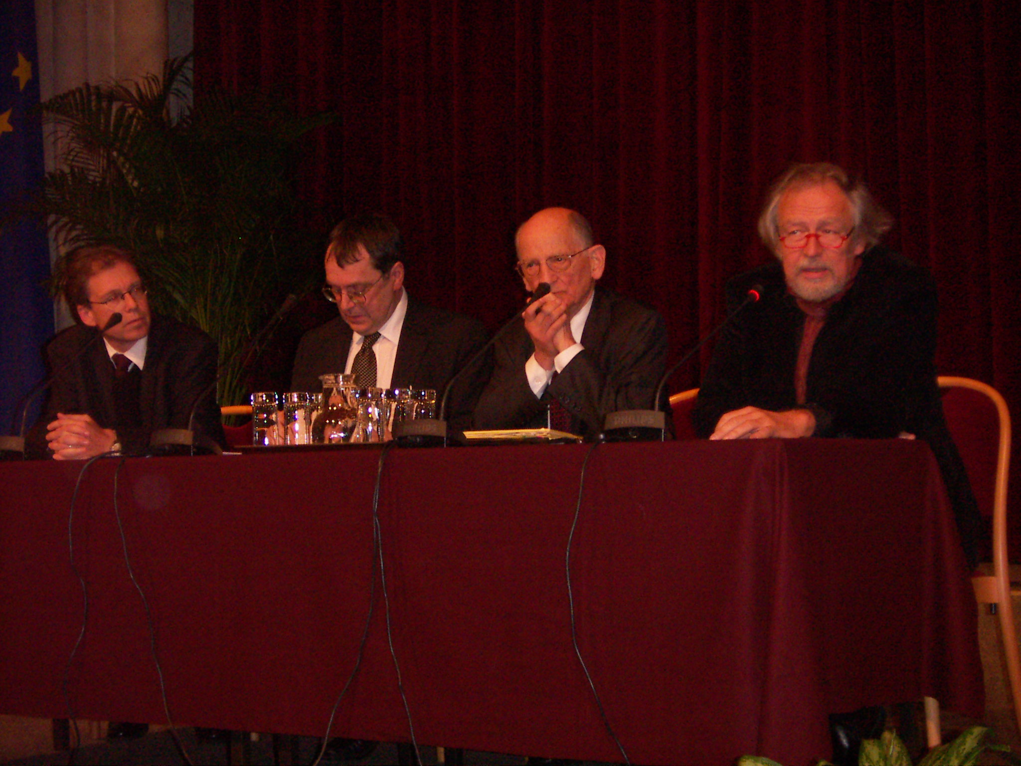 Am Podium von links nach rechts: Claudius Stein, Thomas Macho, Otto F. Kernberg, Hubert Christian Ehalt, am 12. November 2008 in den Wiener Vorlesungen.